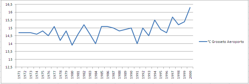 Stazione meteorologica di Grosseto Aeroporto: andamento della temperatura media annua dal 1971 al 2000